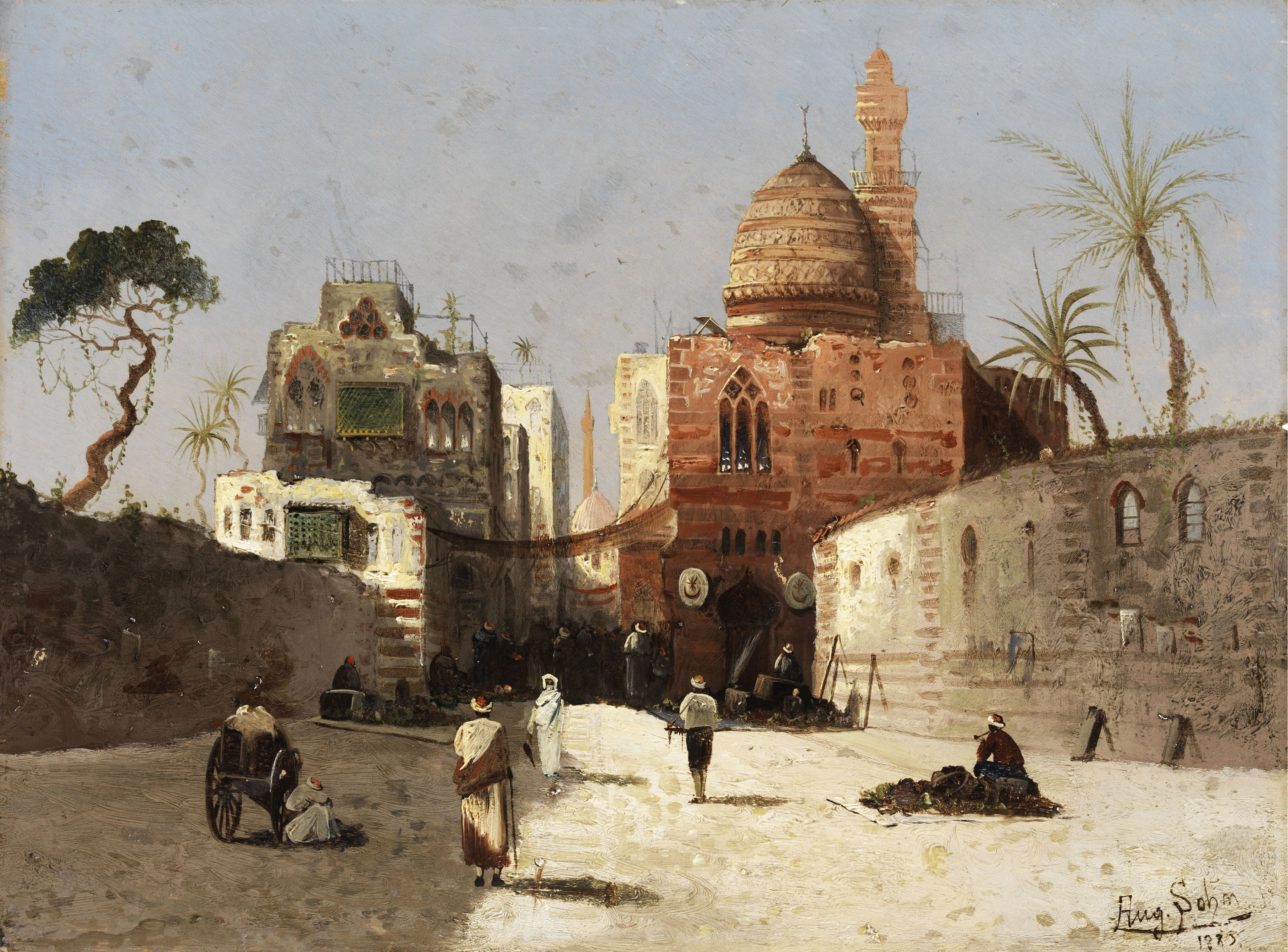 Orientalische Straßenszene mit Moschee, Minarett und Händlern auf einem Vorplatz.